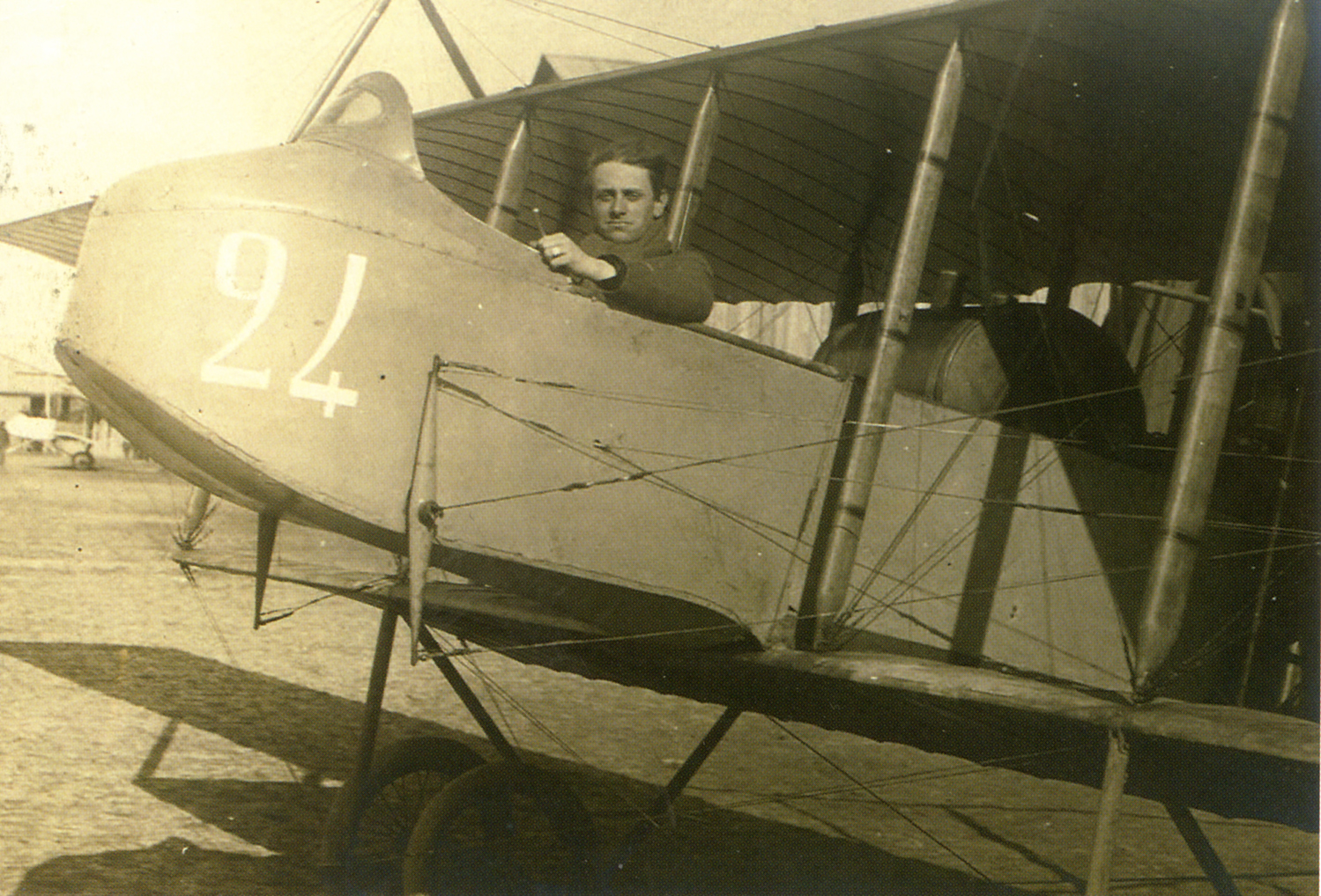 André De Meulemeester in his flying machine during WW1